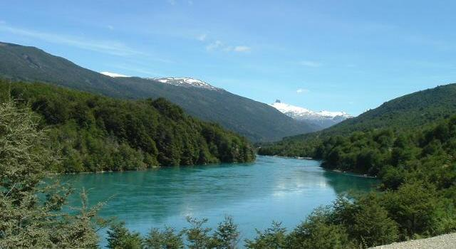 Río Baker en la región de Aisén, Chile.